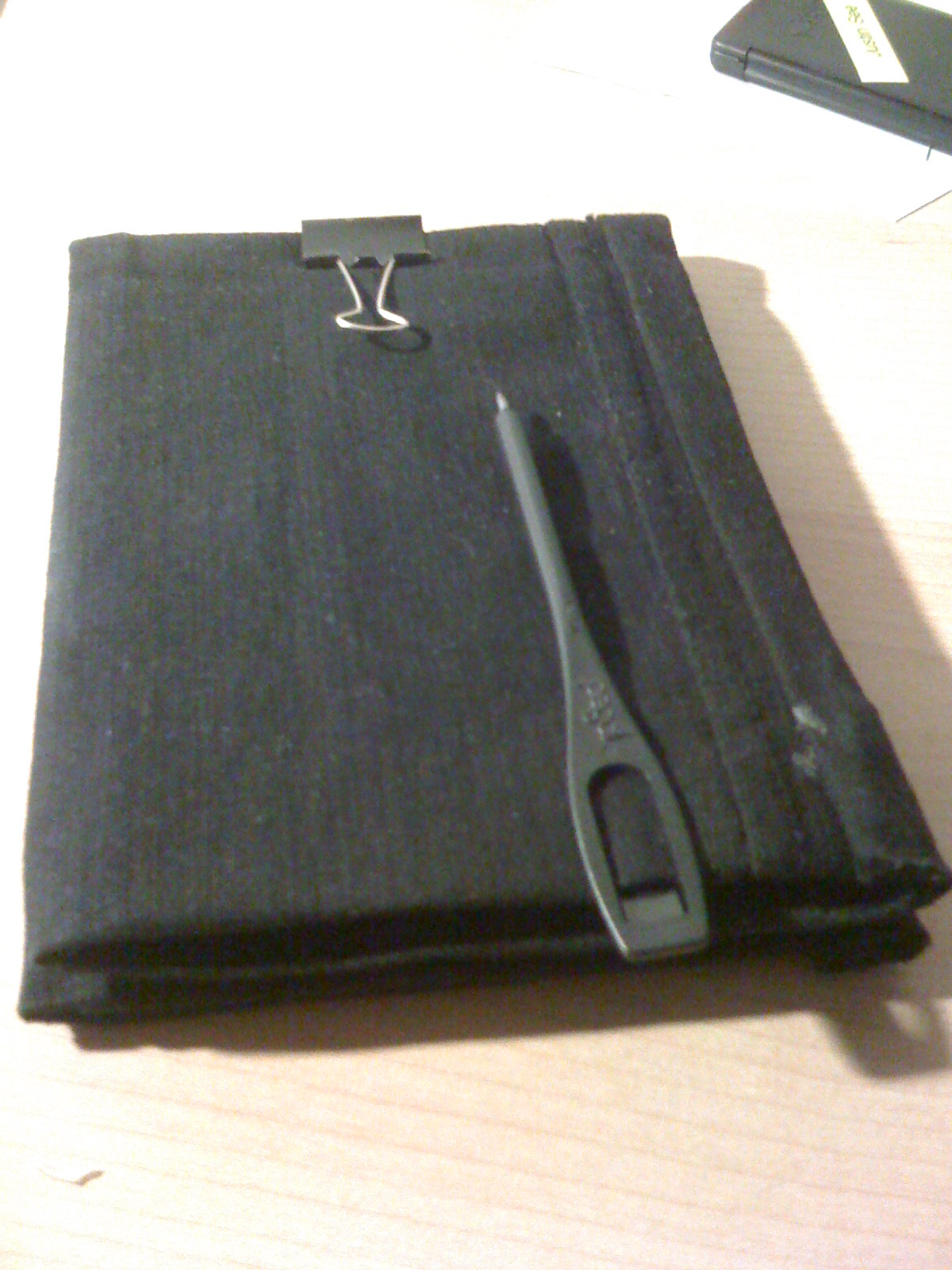 Hipster TDL Cover